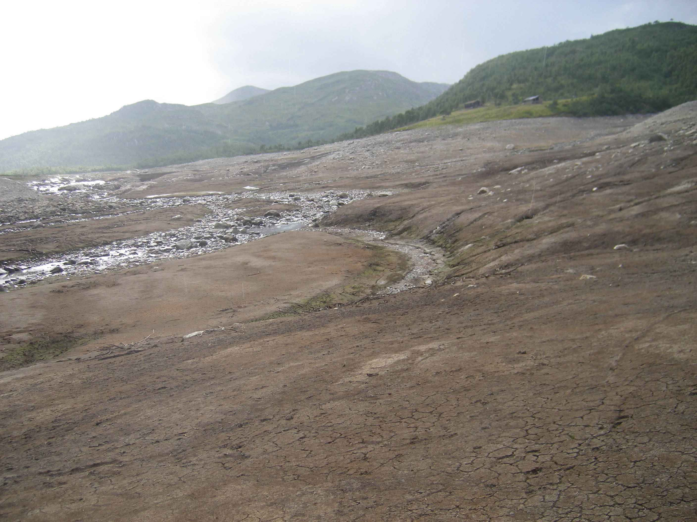 Bordalsvatn, Vinje. Vannet ble kraftig nedtappet i 2006